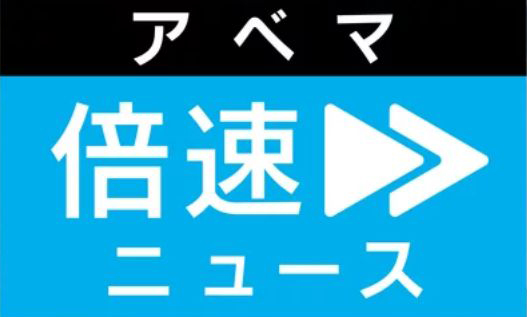 ABEMABAISOKUロゴ